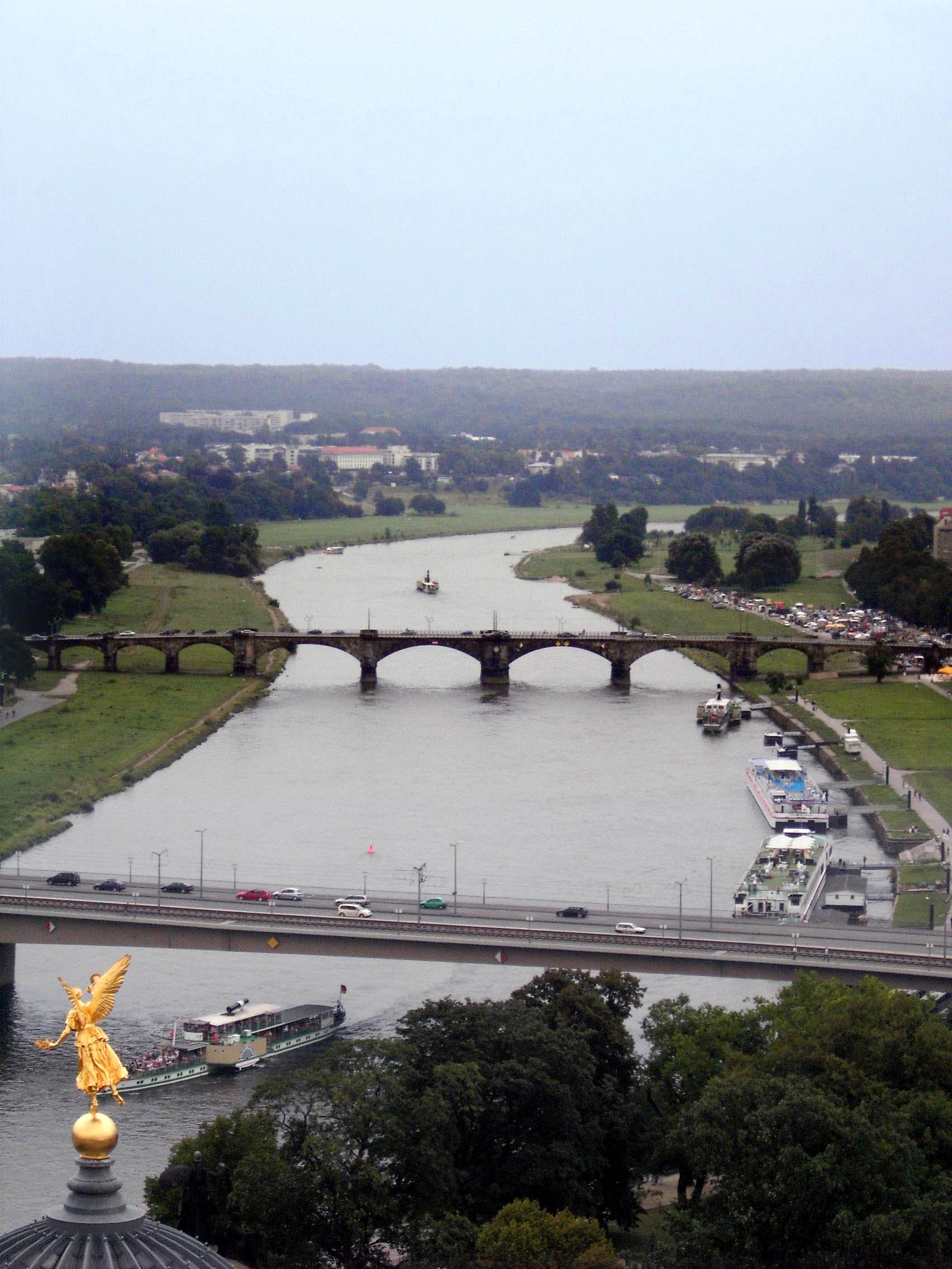 Dresden. View from Frauenkirche.